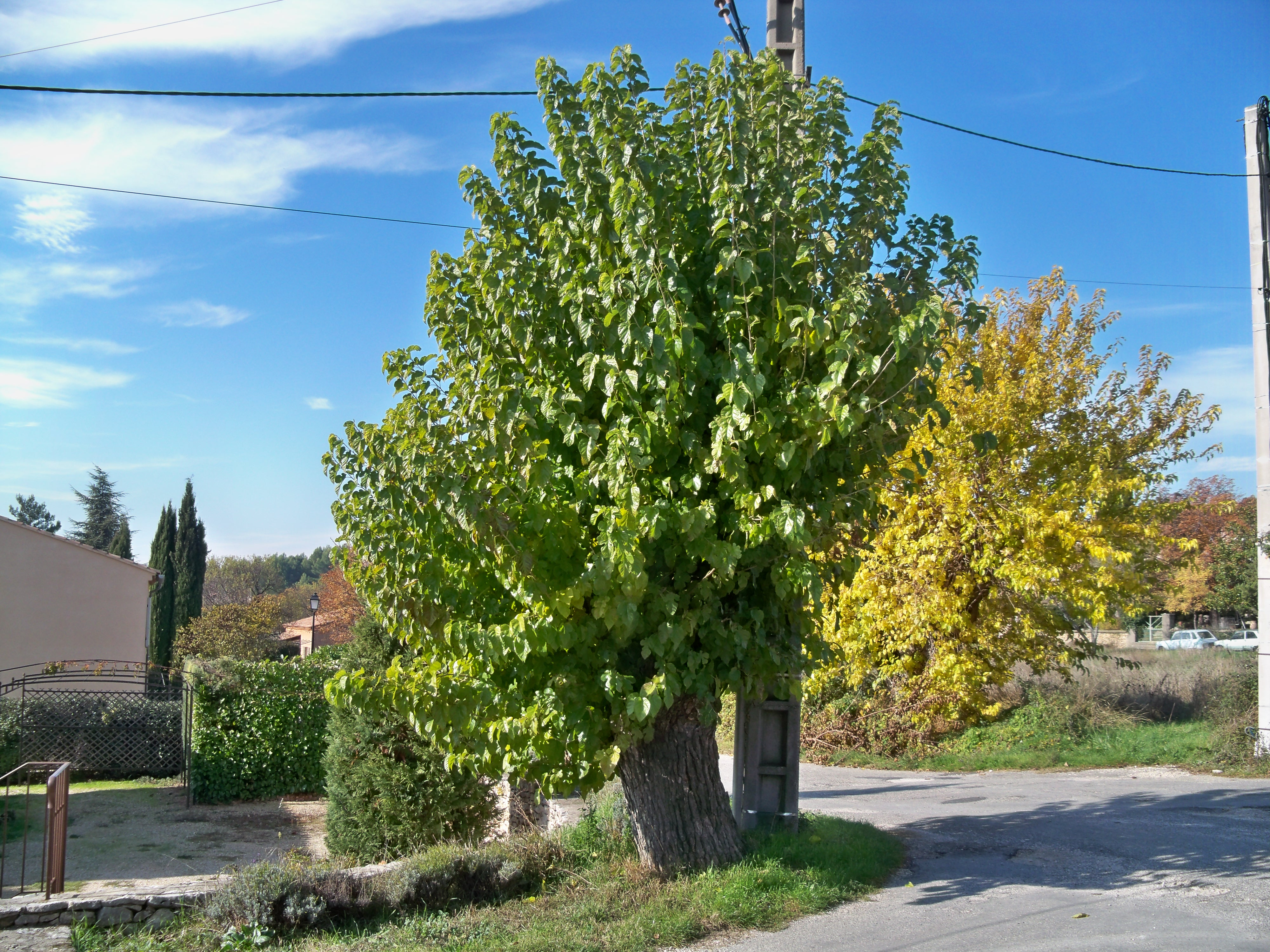 Murier à Grand Clément, Vaucluse, France